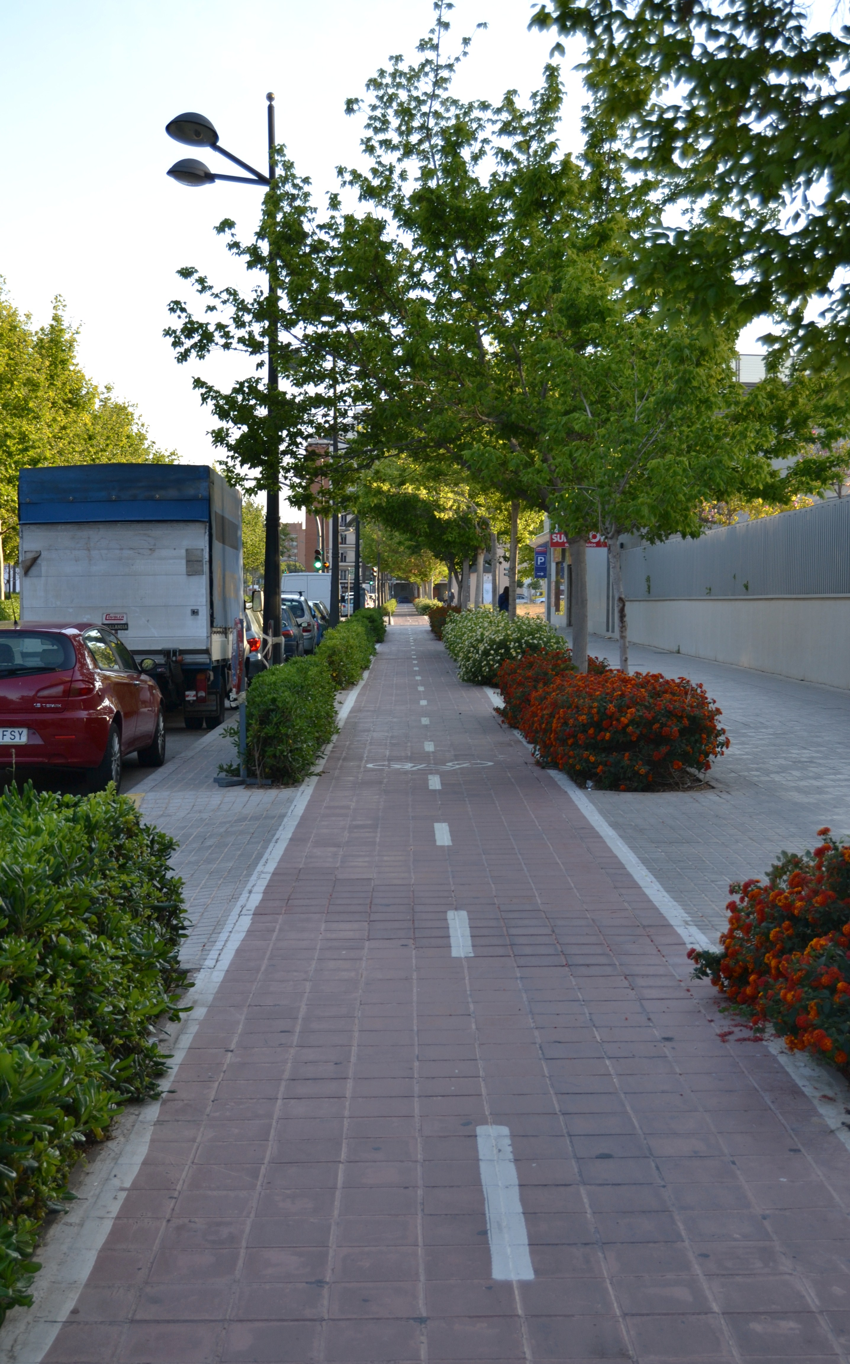 Carril bici al carrer d'Alfauir, València.